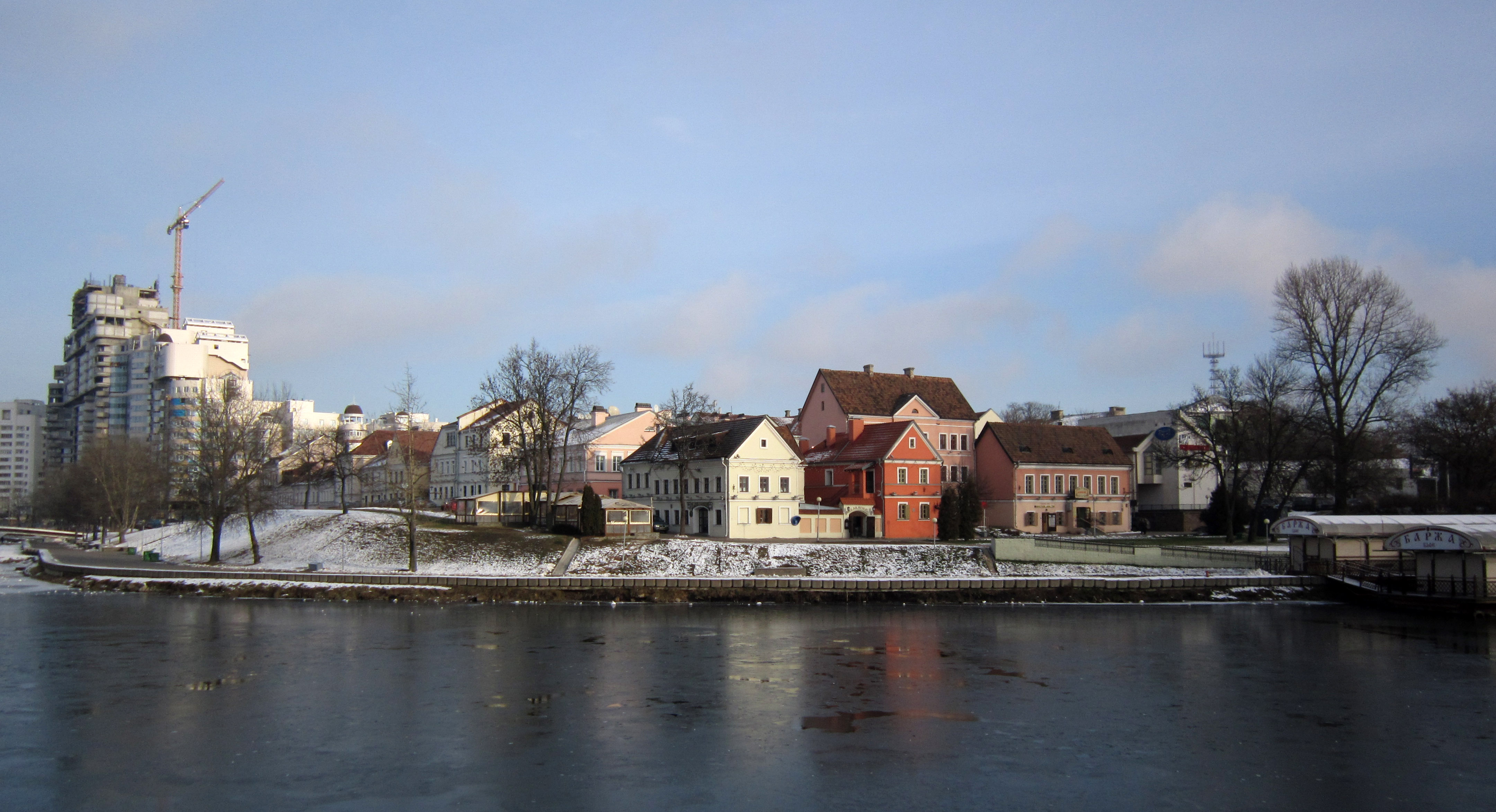 Минск. Троицкое предместье и жилой комплекс «У Троицкого»